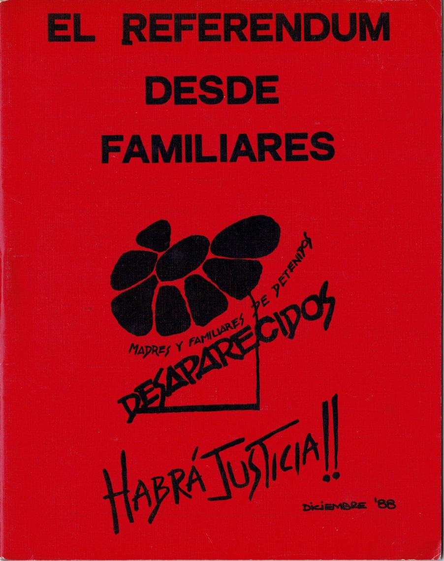 Portada de libros publicados por la organización Madres y familiares de detenidos desaparecidos de Uruguay, licenciados en forma libre para la editatón Wiki DDHH 2018 de Uruguay